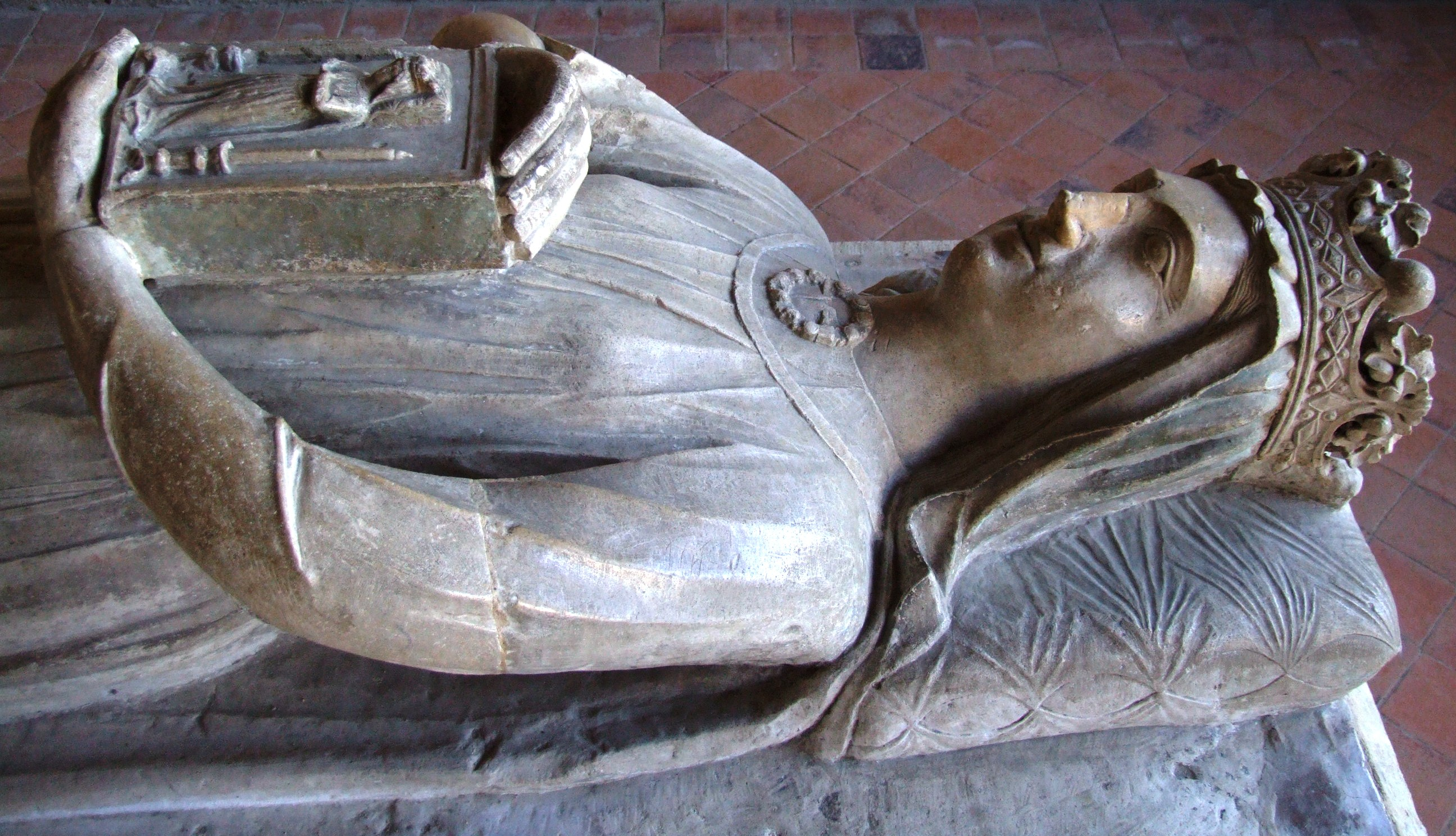 Abbaye de l'Epau - Gisant de Bérangère de Navarre